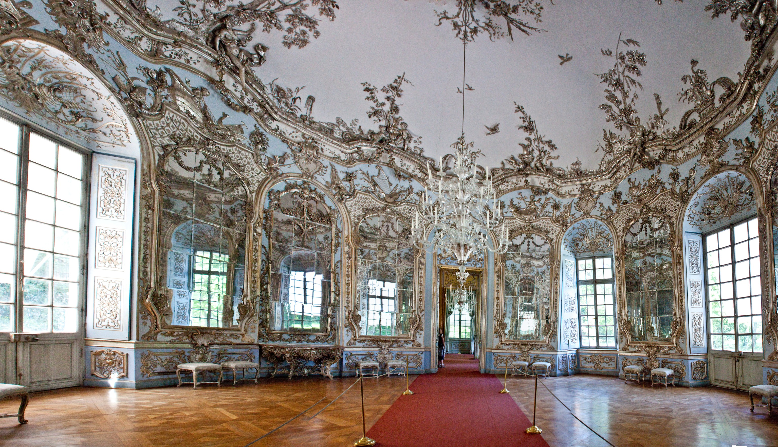 Мюнхен (Бавария), Нимфенбург, Амалиенбург, интерьер, рококо